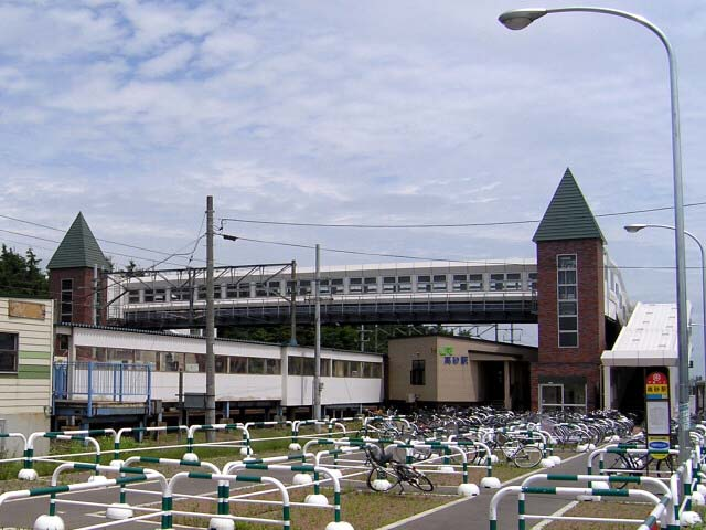 Takasago Station in Hakodate Main Line, Japan